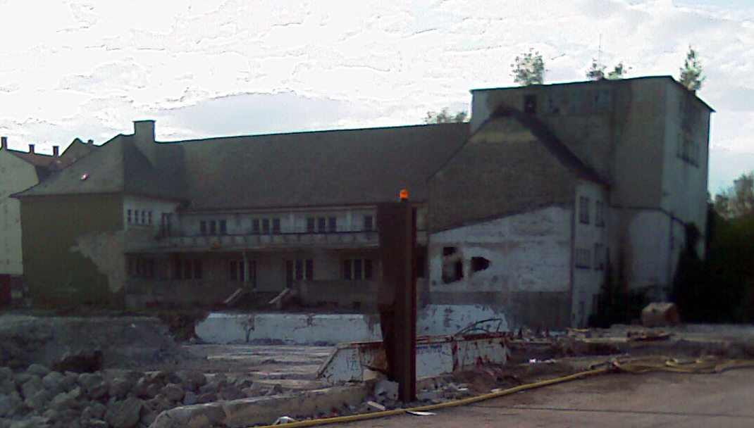 Die Rückseite des Feierabendhaus (Bühnenbau) in Frankenthal. Sorry, für die schlechte Qualität, war eine Handykamera. Versuche ein besseres Foto demnächst zu machen.